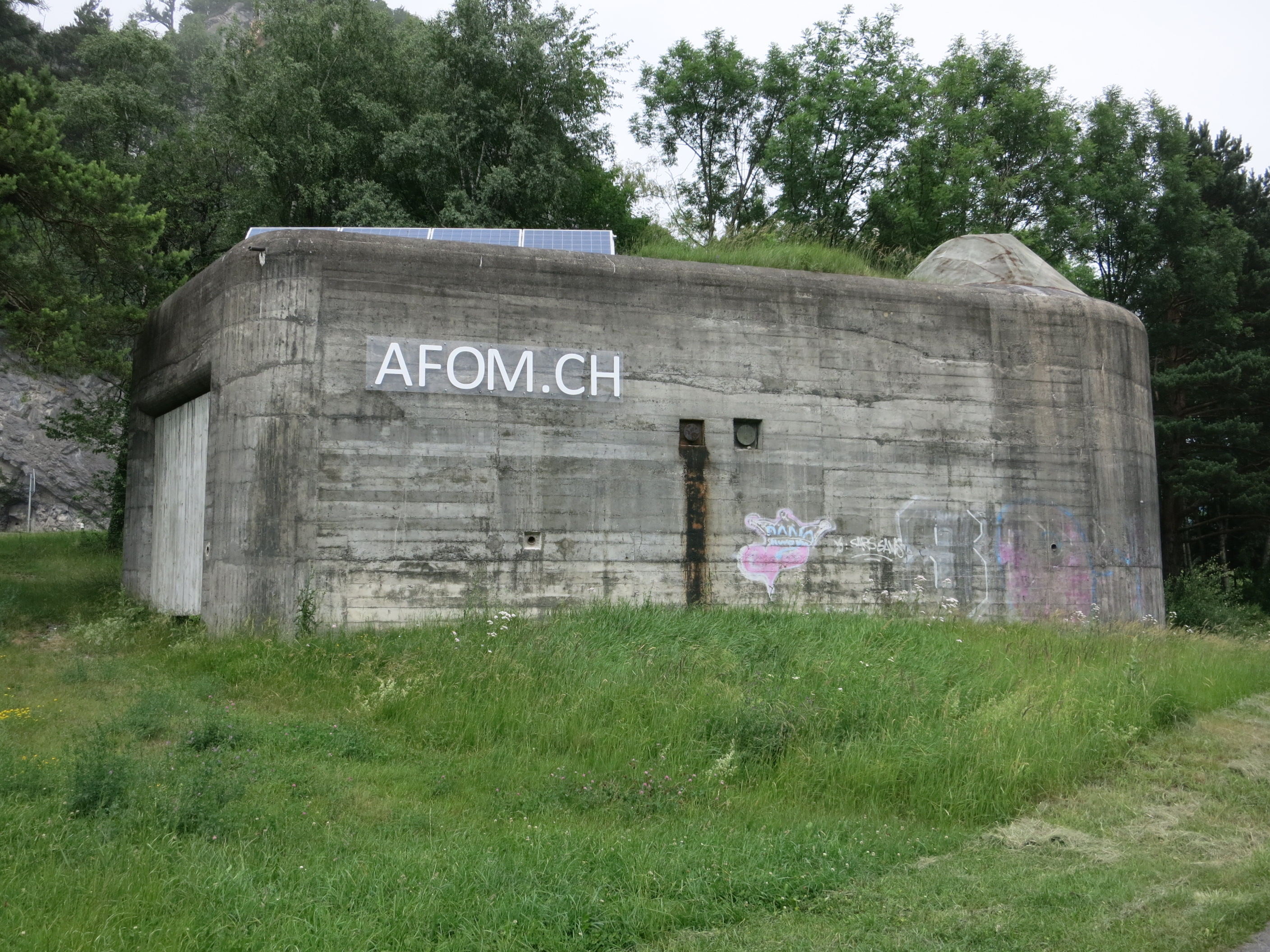 Festung Schollberg SG, Schweiz